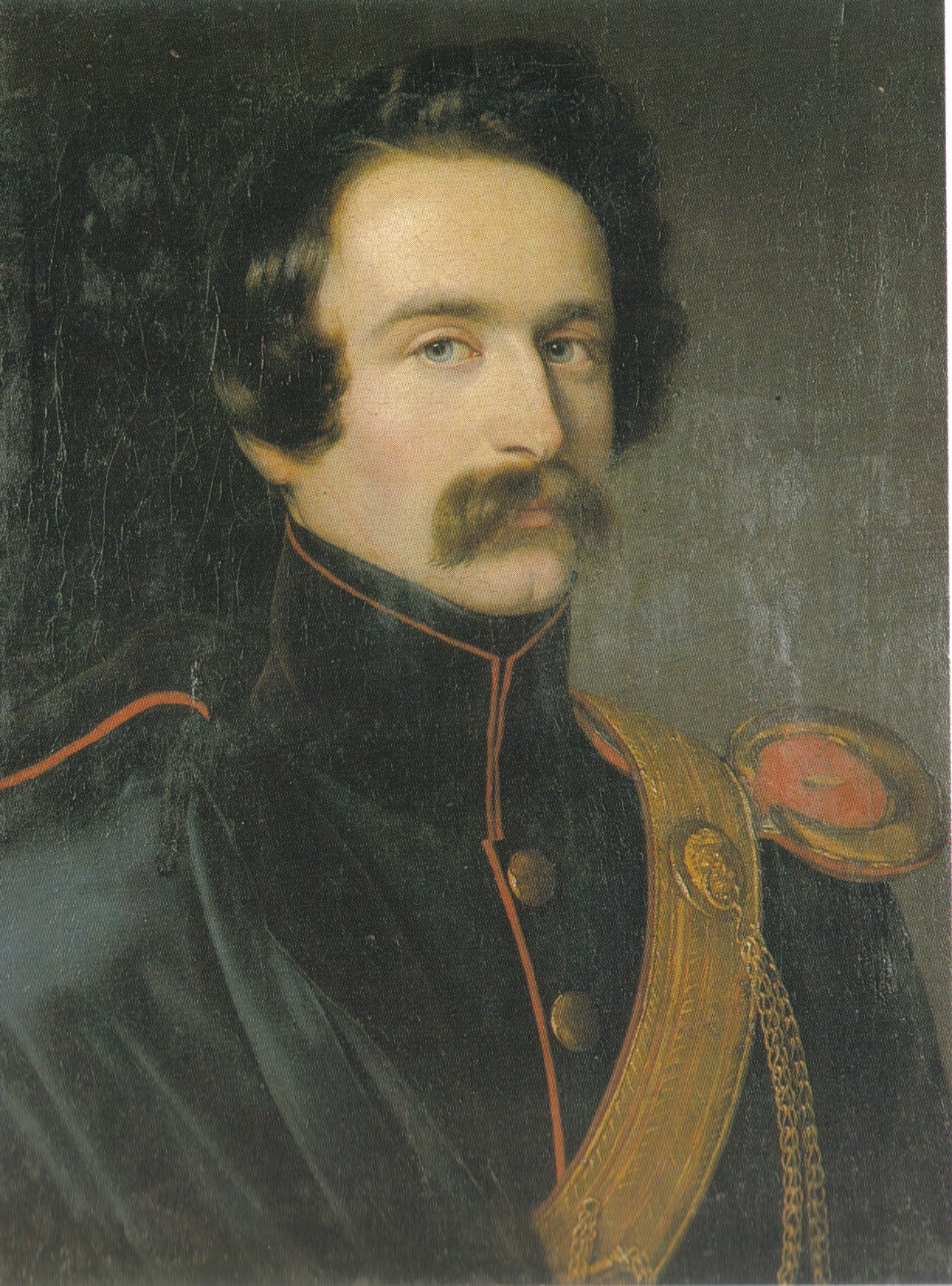 Julius Göler von Ravensburg (1814-1843) wurde in einem im Zusammenhang mit der Göler - Haber Affäre ausgetragenen Pistolenduell tödlich verwundet.